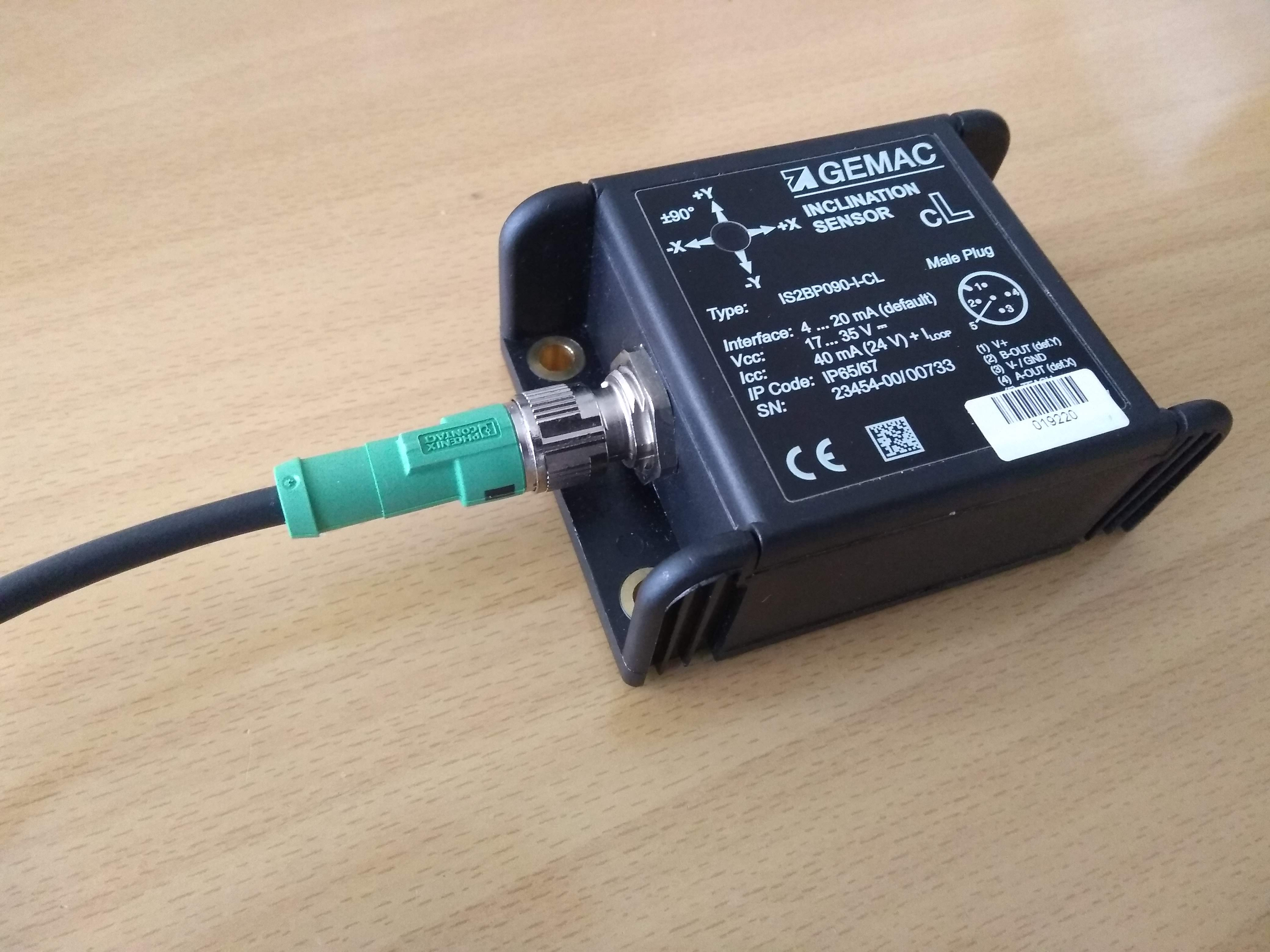 Jest to przyrząd do pomiaru kąta nachylenia obiektu względem siły grawitacji